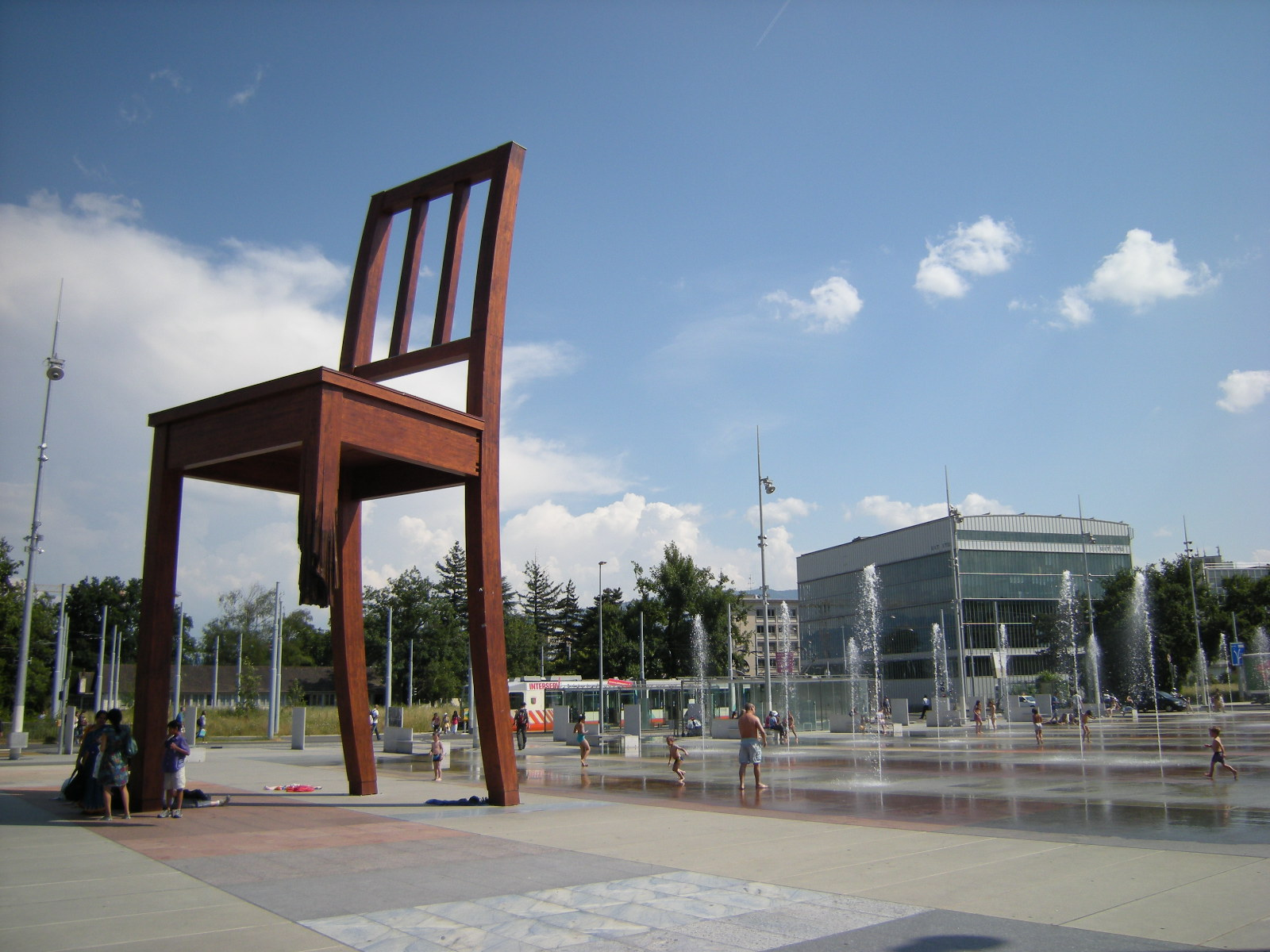 Escultura de Daniel Berset - em frente à sede da ONU